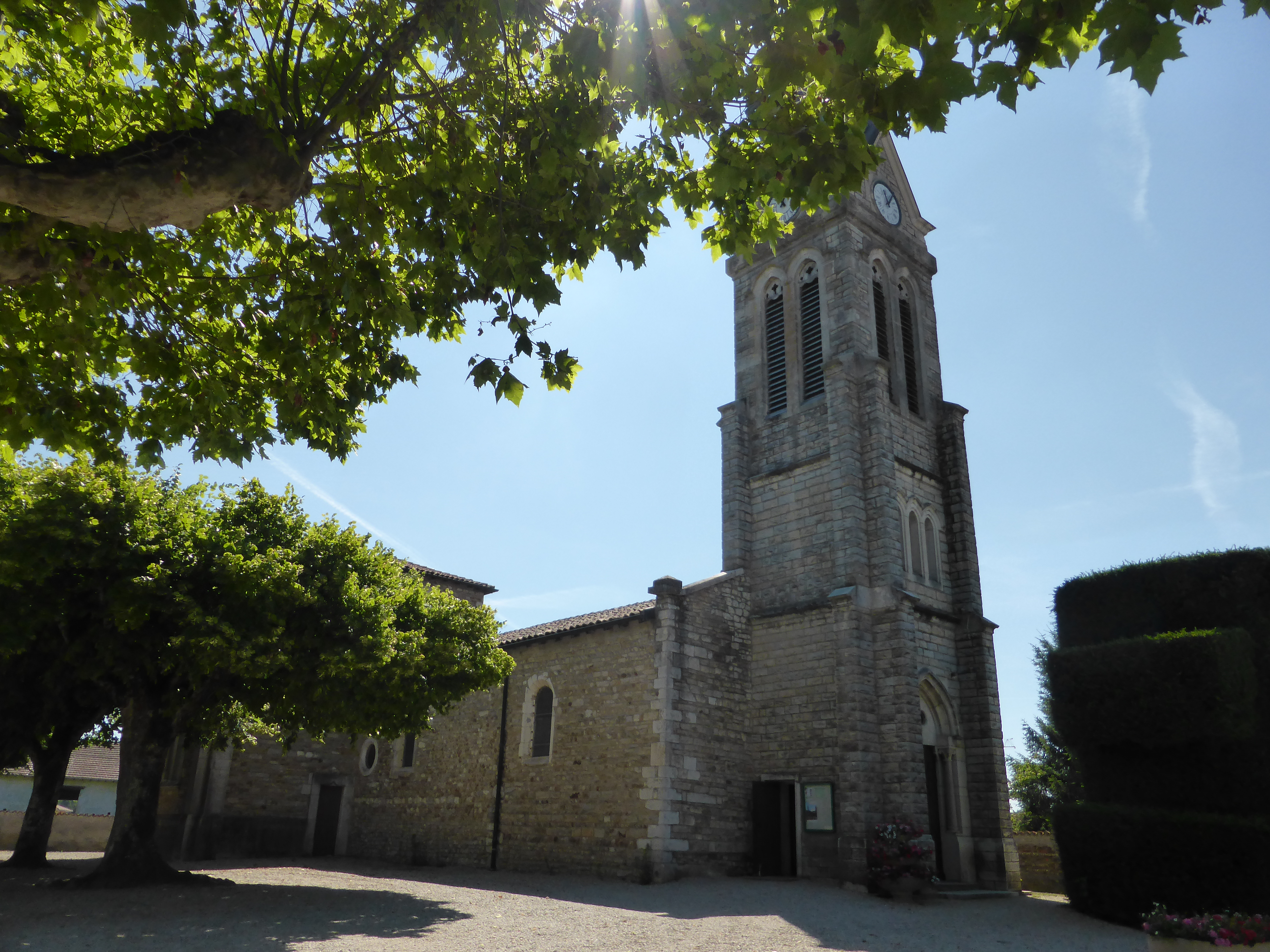 Église Saint-Denis de Saint-Denis-les-Bourg, dans l'Ain.